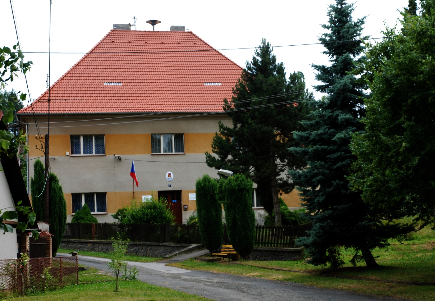 Obecní úřad Panoší Újezd